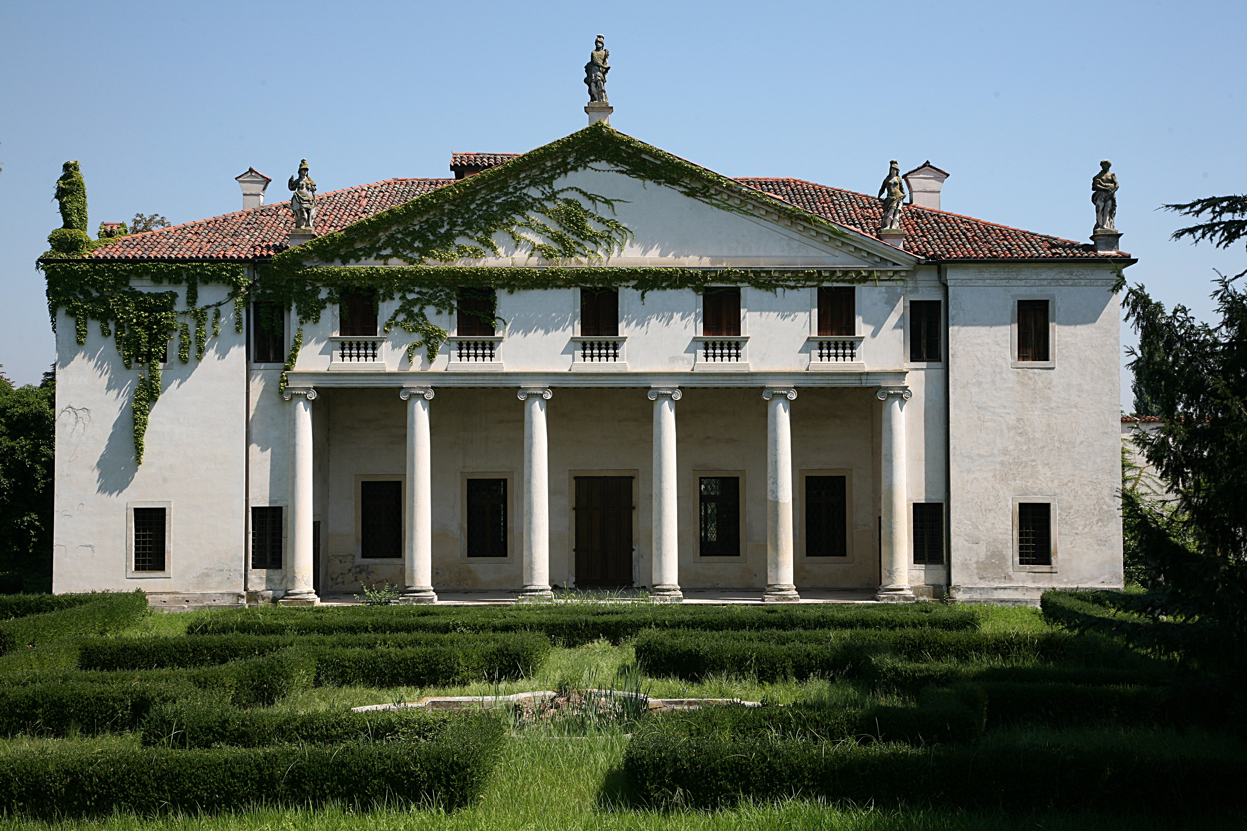 A villa in Bolzano Vicentino just outside Vicenza by Andrea Palladio.